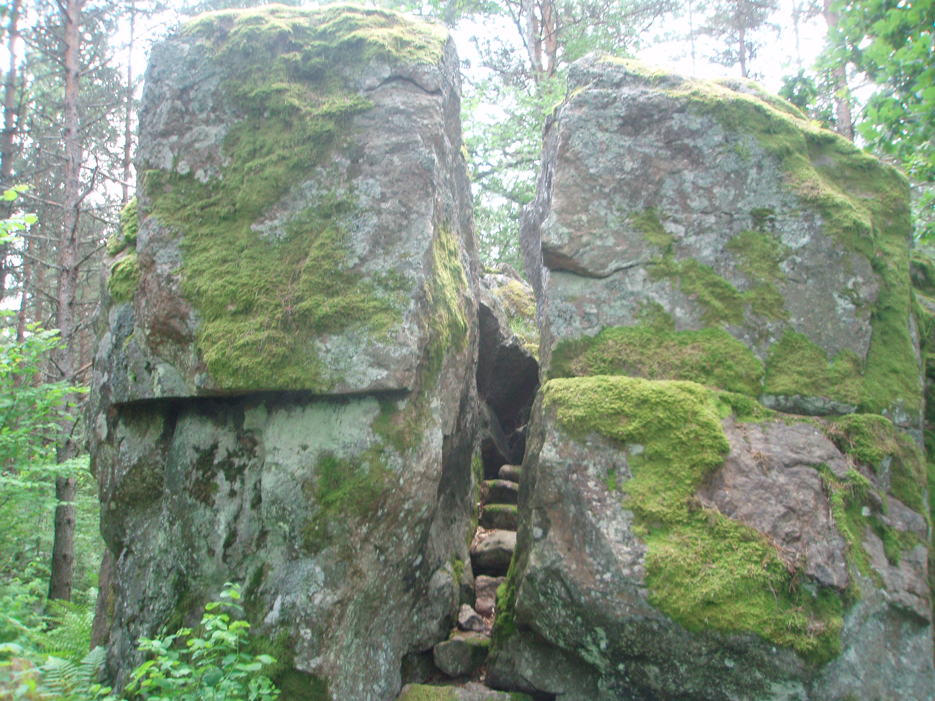 Rahvapärimustega seotud kivi "Härjakivi"